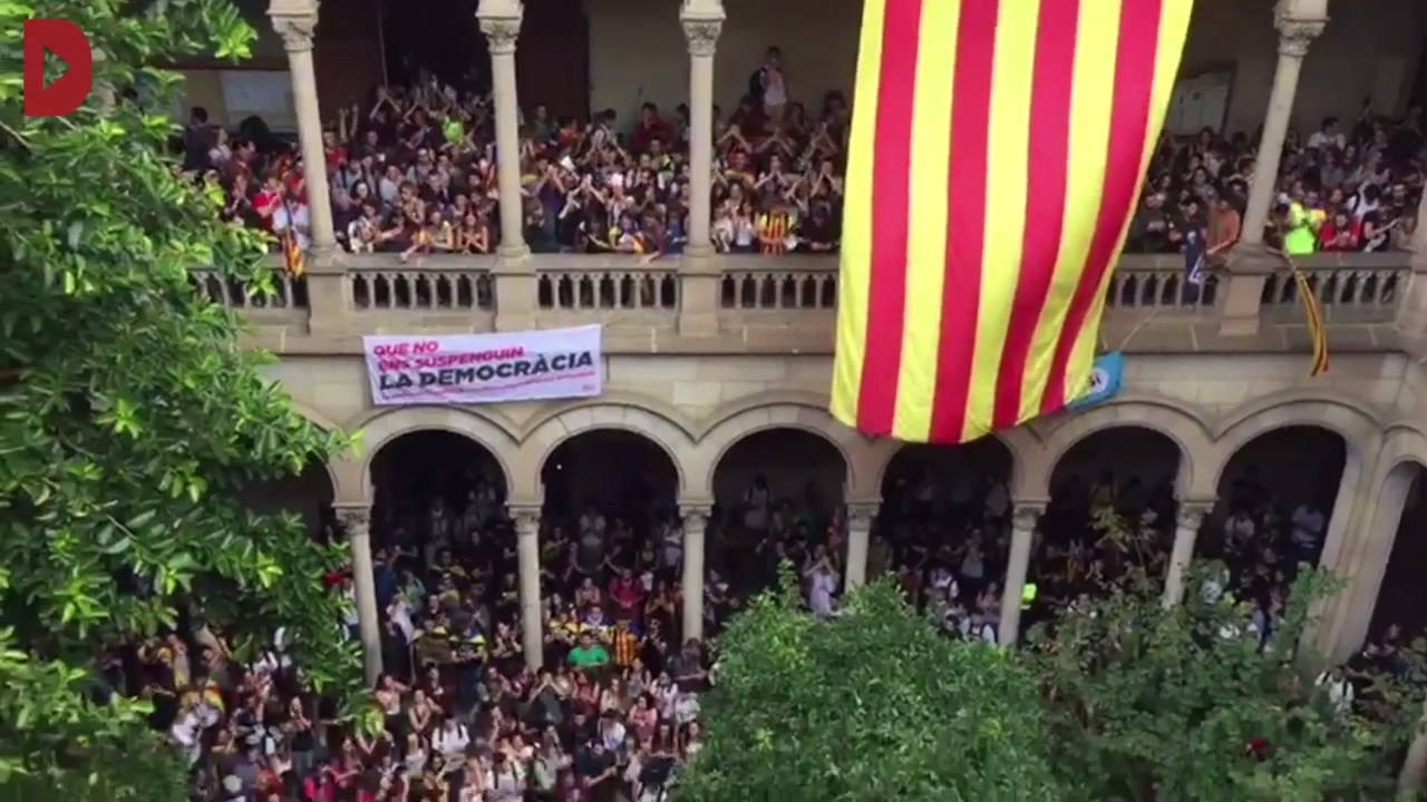 Estudiants ocupen l'edifici històric de la UB en defensa de la democràcia i el referèndum el 22 de setembre del 2017.